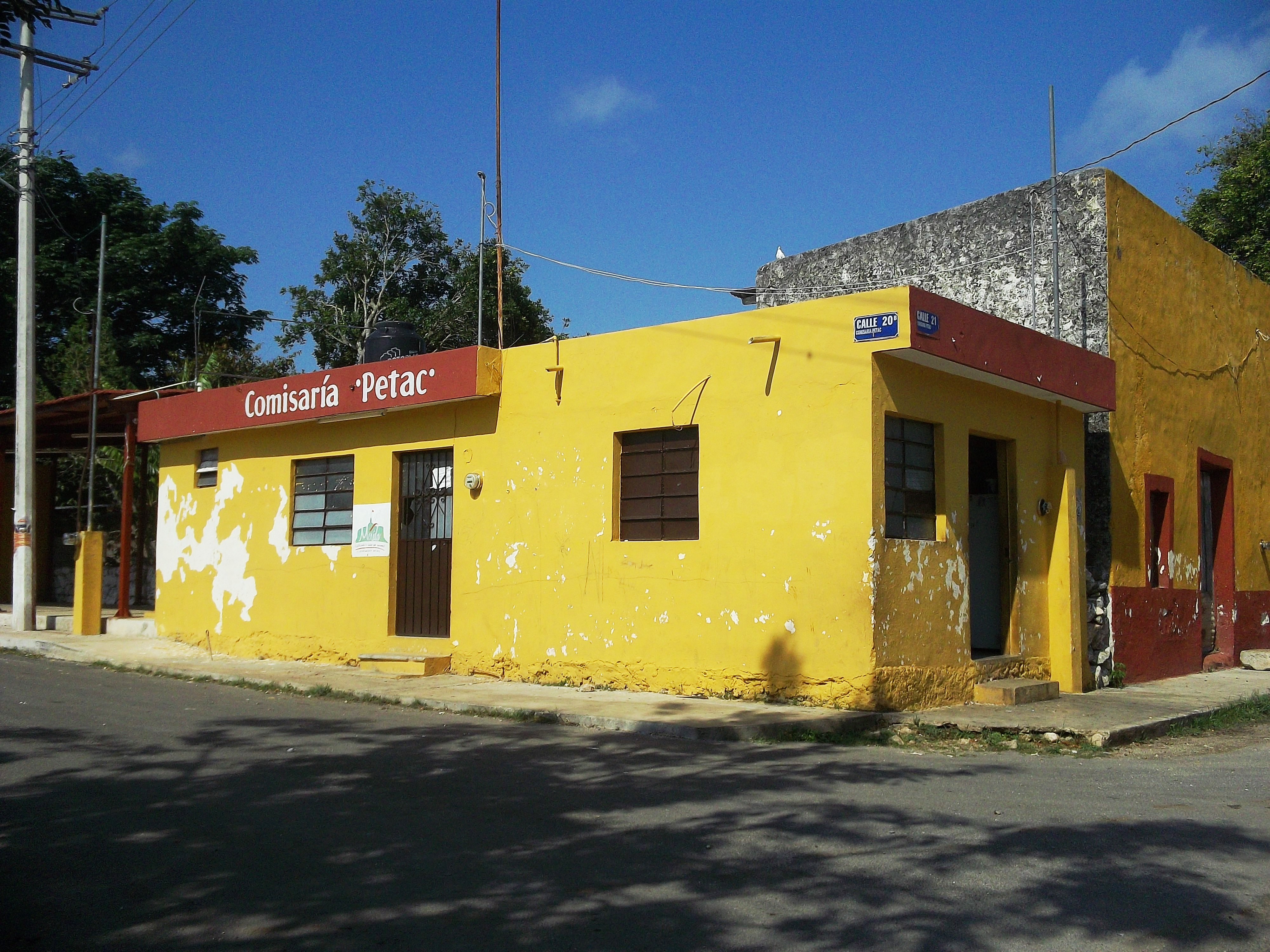 Casa comisarial de Petac, Yucatán.